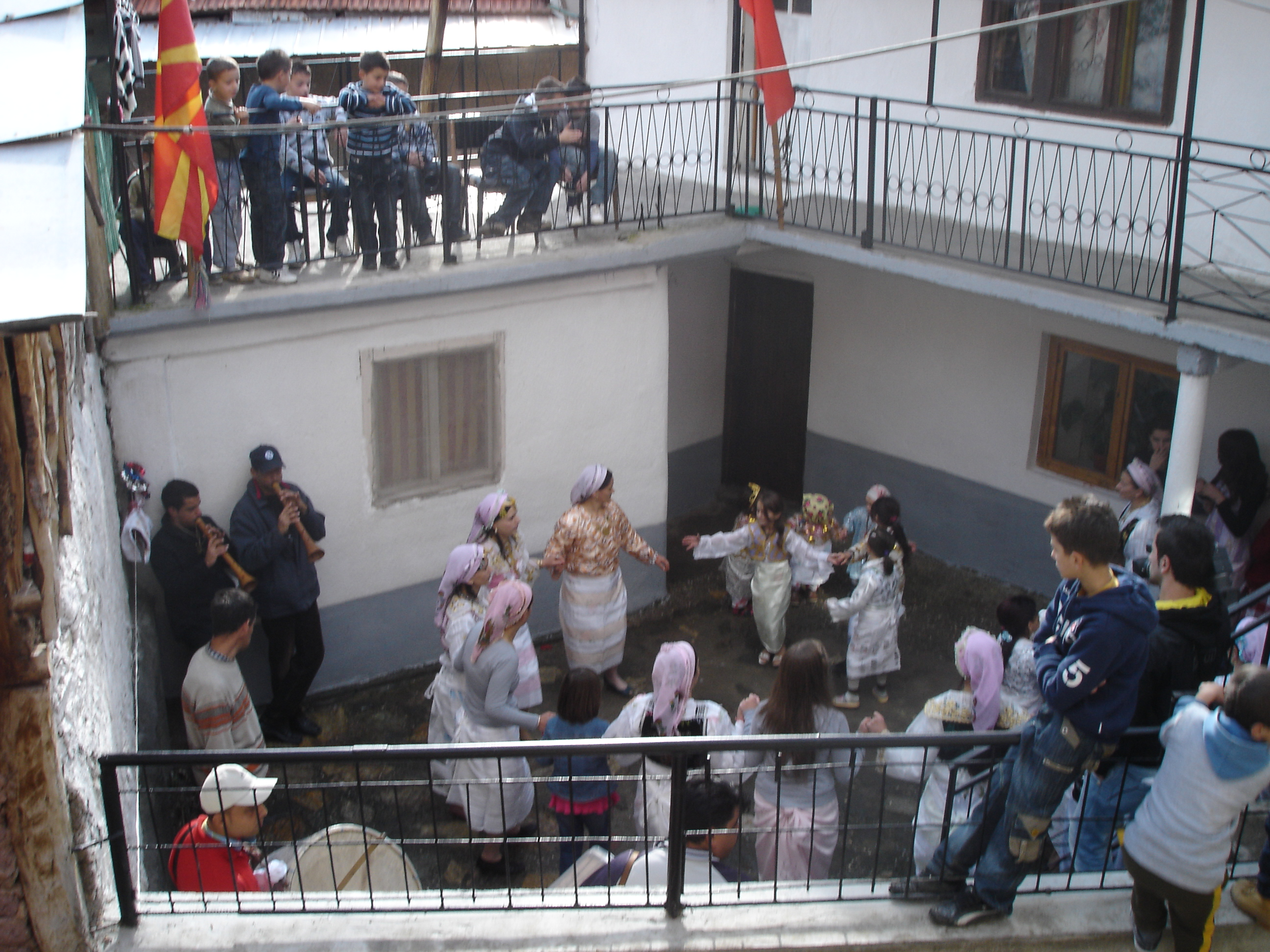 Женско оро на прослава на Сунет во Горно Косоврасти